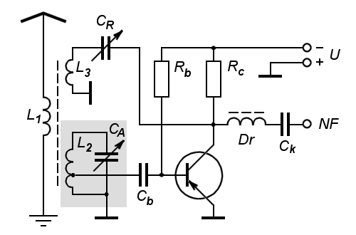 Schaltbild eines Reflexaudions